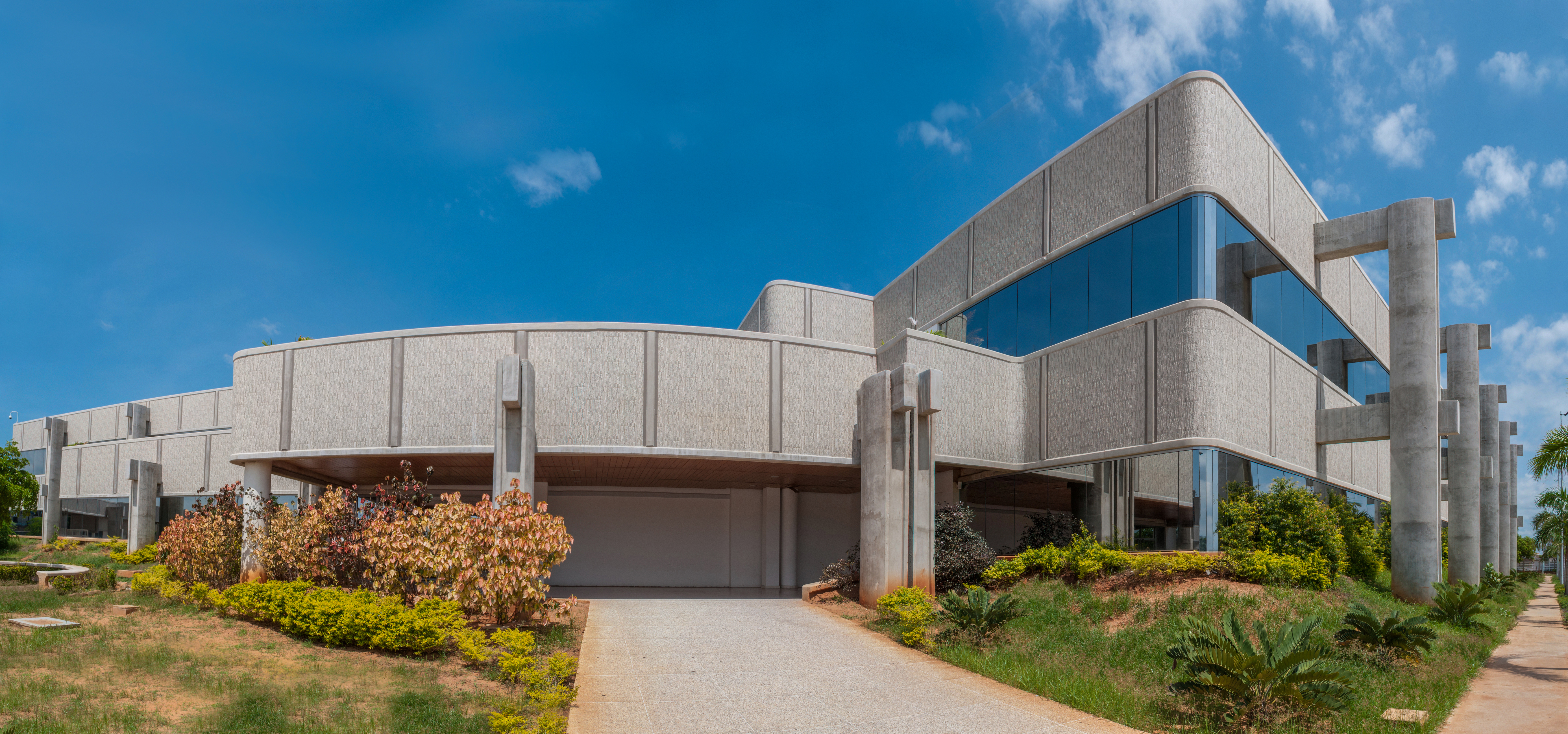 Oficinas administrativas de CORPOELEC, Fuerzas Armadas, Maracaibo, Venezuela